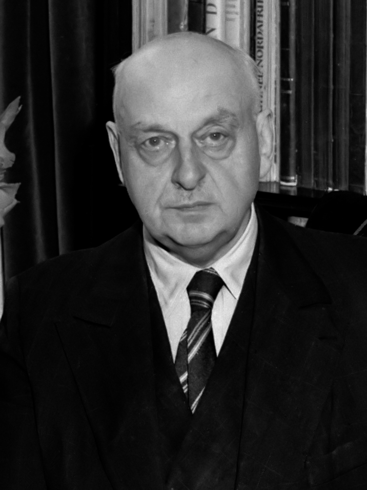 Schilder Kees Maks 70 jaar 22 augustus 1946